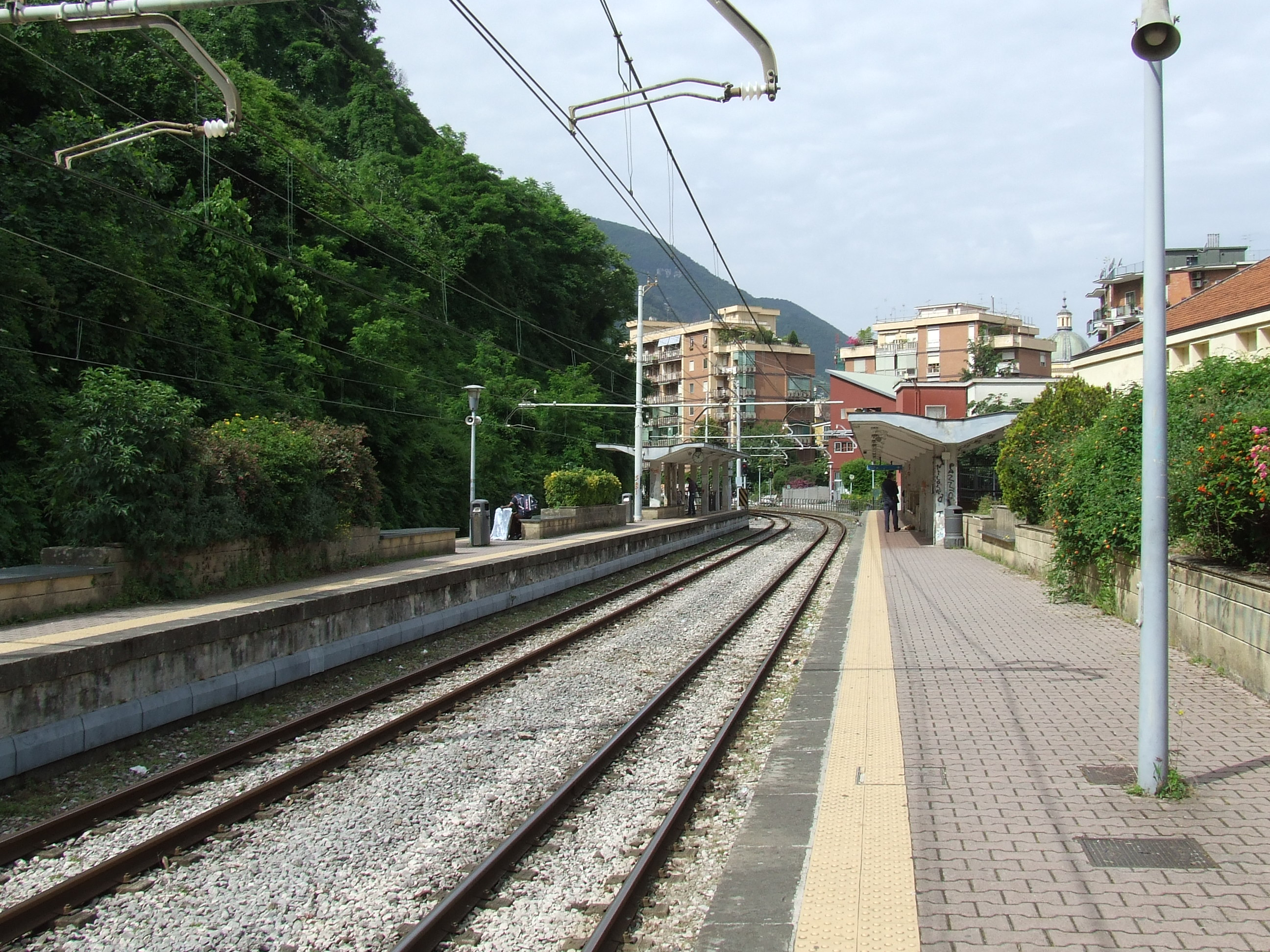 Stazione di Castellammare di Stabia, linea Torre Annunziata - Sorrento, Circumvesuviana, EAV - area banchine